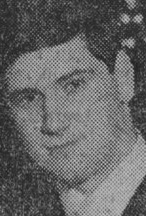 Arkitekten Pietro Raffone